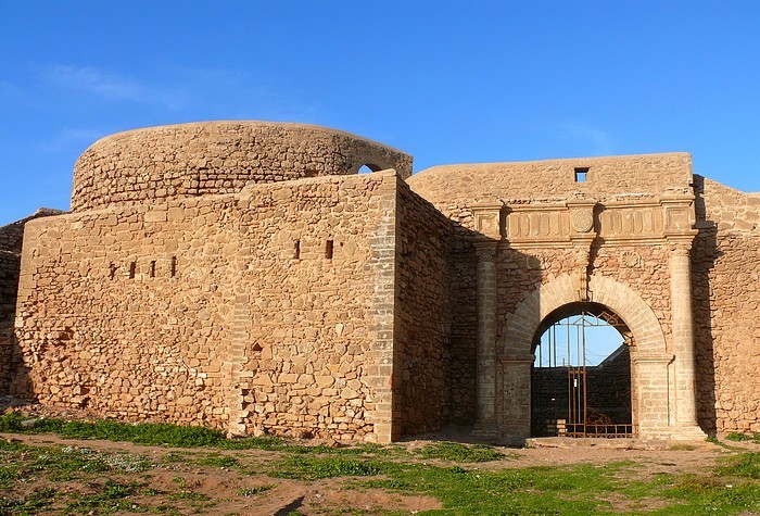 Bordj Roukni à Salé